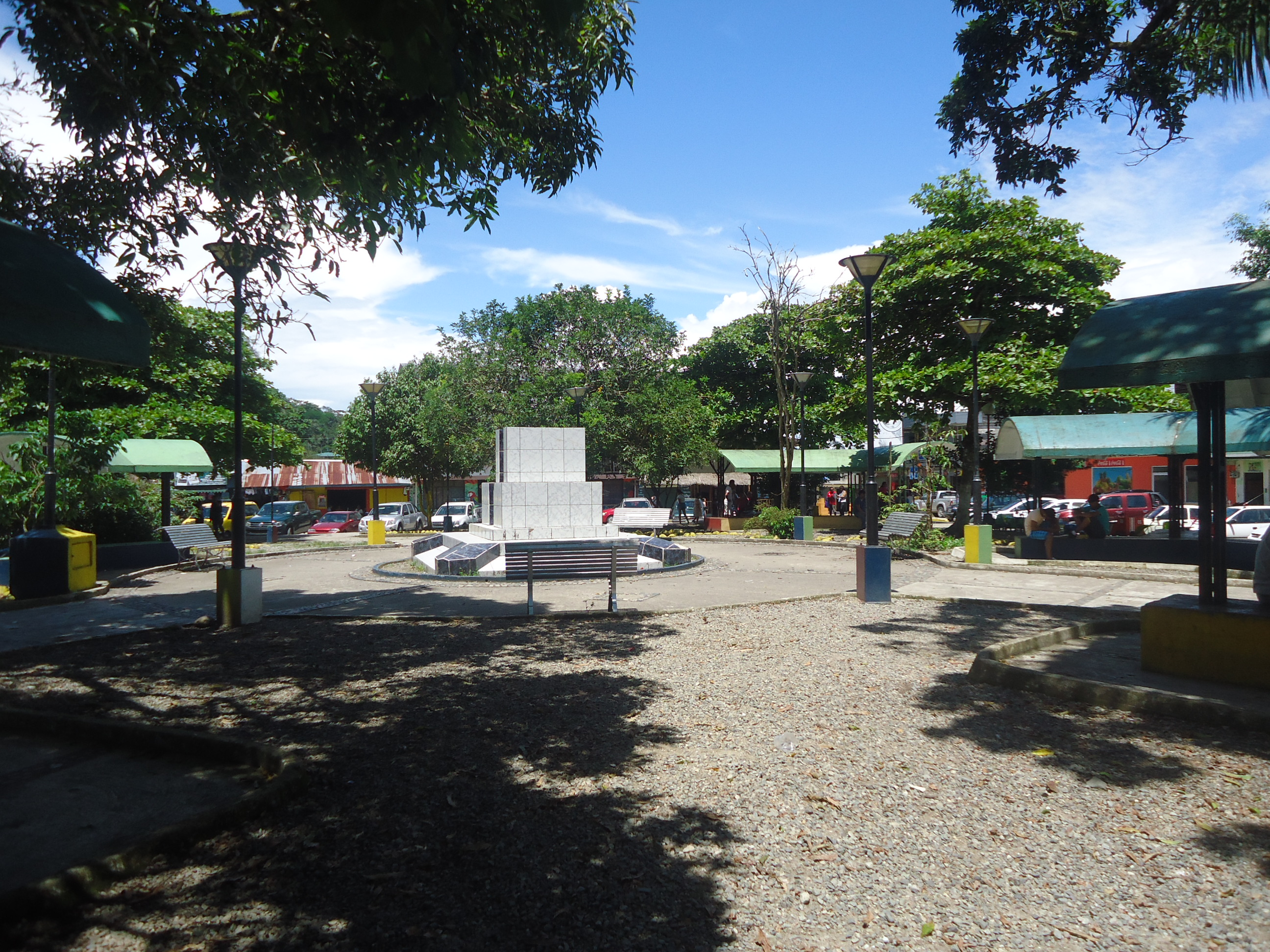 Parque Central de Puerto Misahuallí, Provincia de Napo